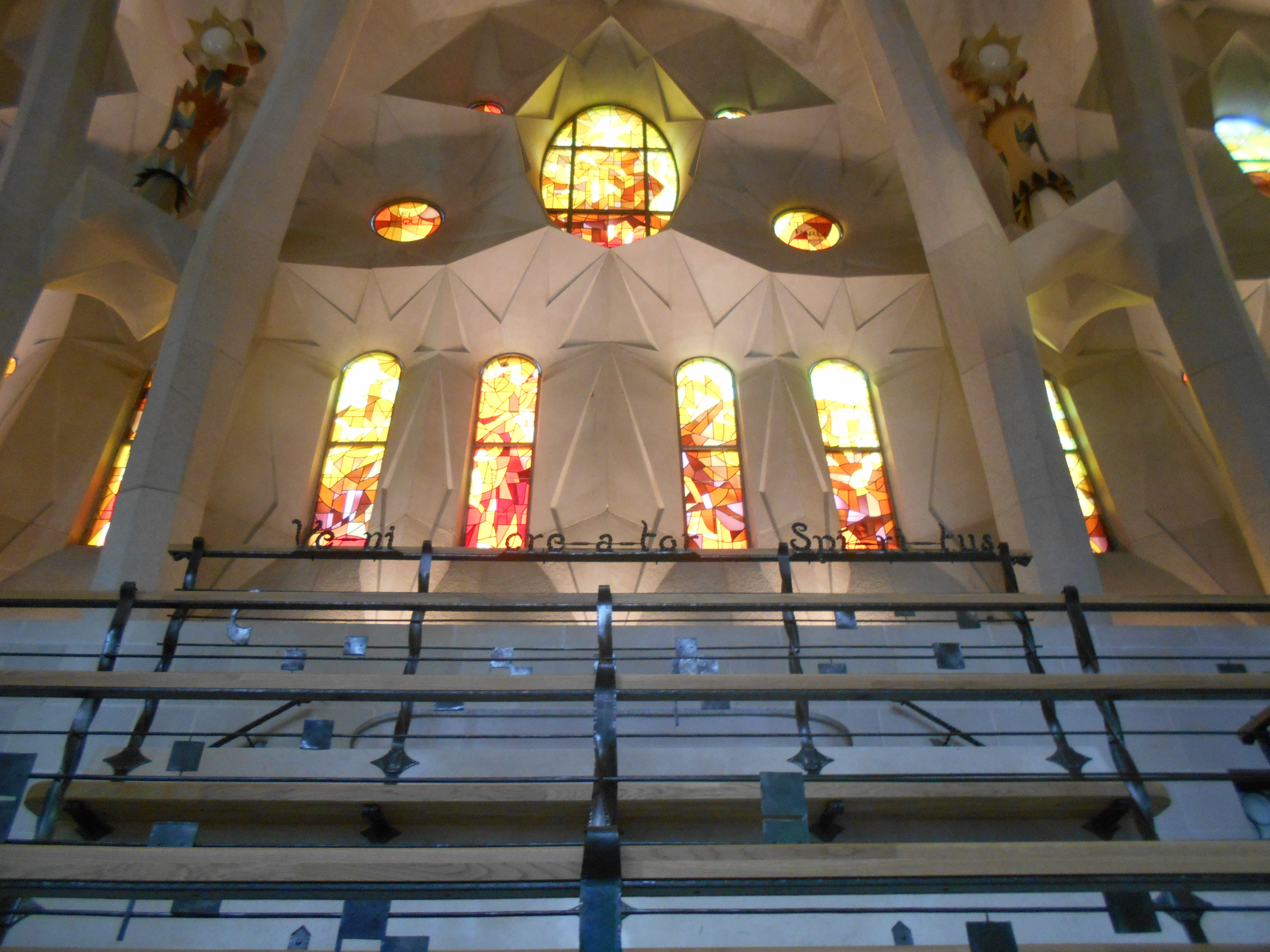 Detalle de una de las cantorías, con la inscripción del himno Veni Creator Spiritus.